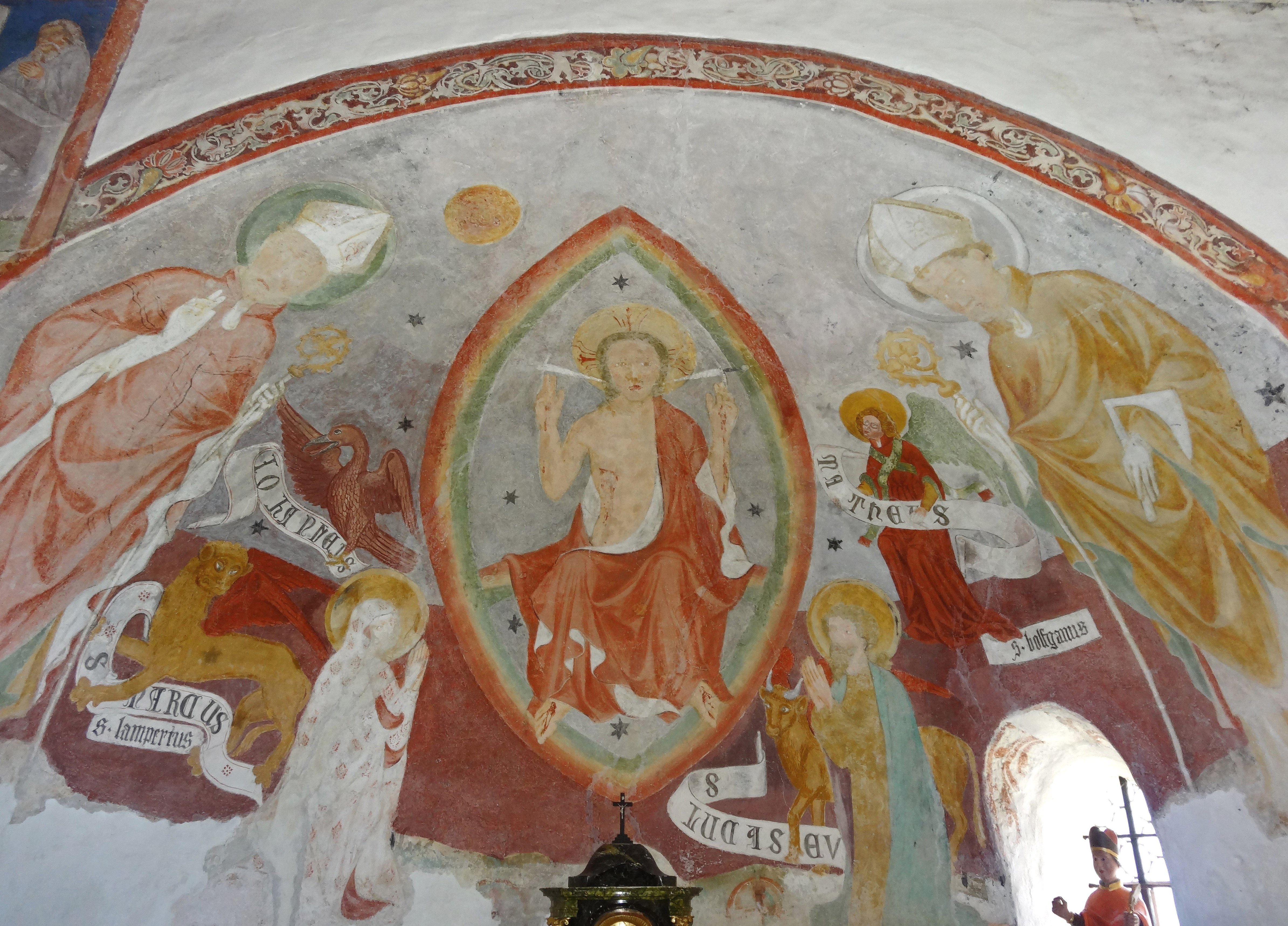 Kath. Filialkirche hl. Lambert, Hart (Feldkirchen in Kärnten). Fresko: Christus in der Mandorla, in der Apsis